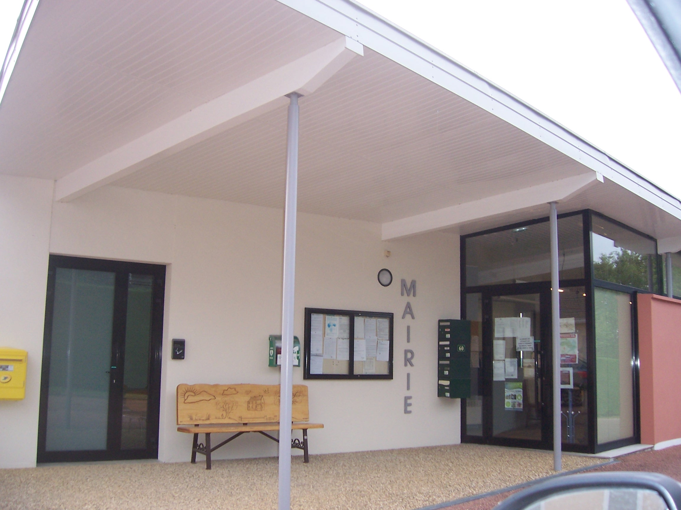 Mairie de Troncy